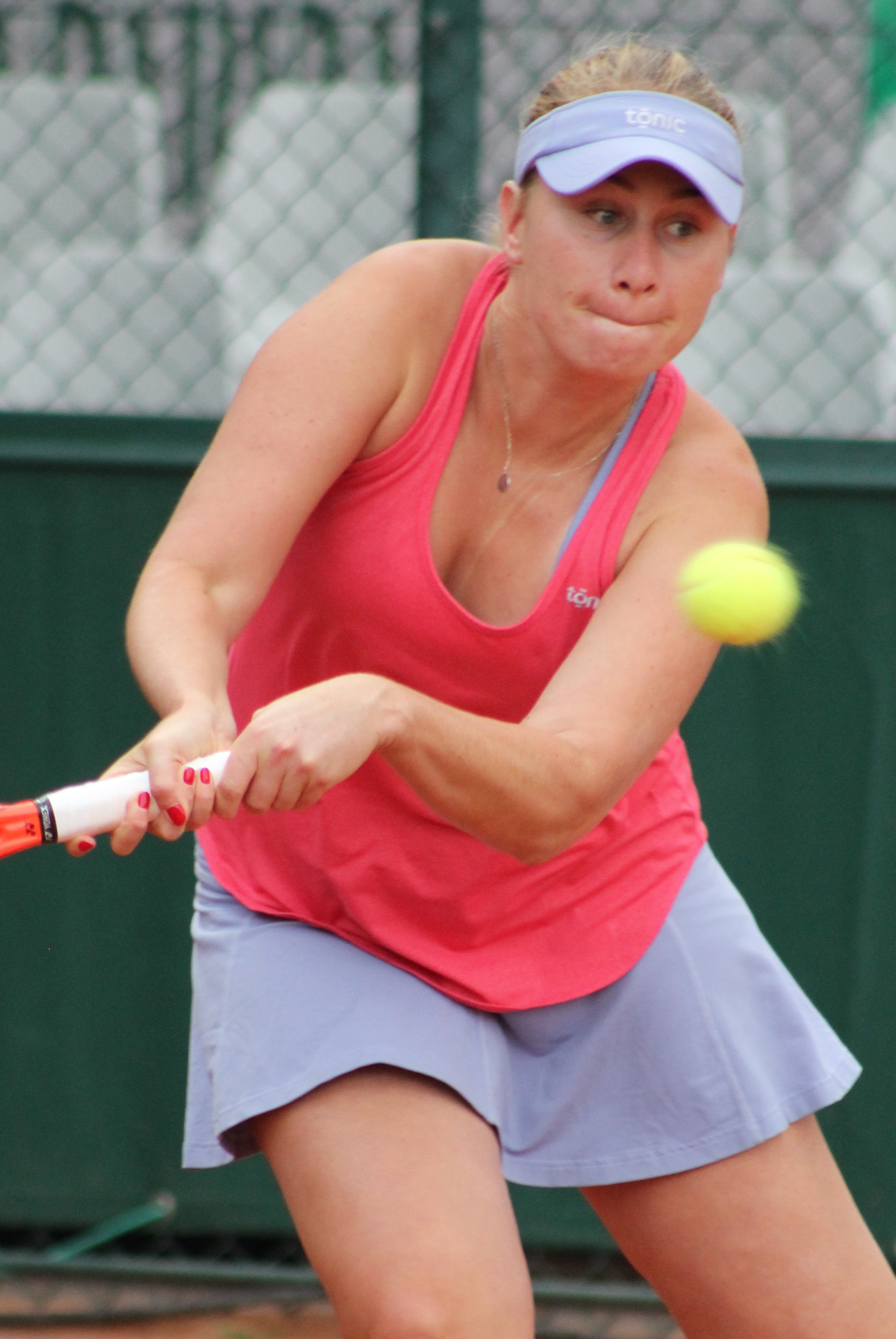 Bogdan E. RG15 (11)